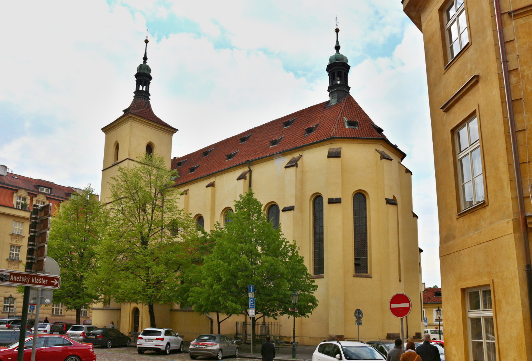 Staré Město kostel sv. Haštala